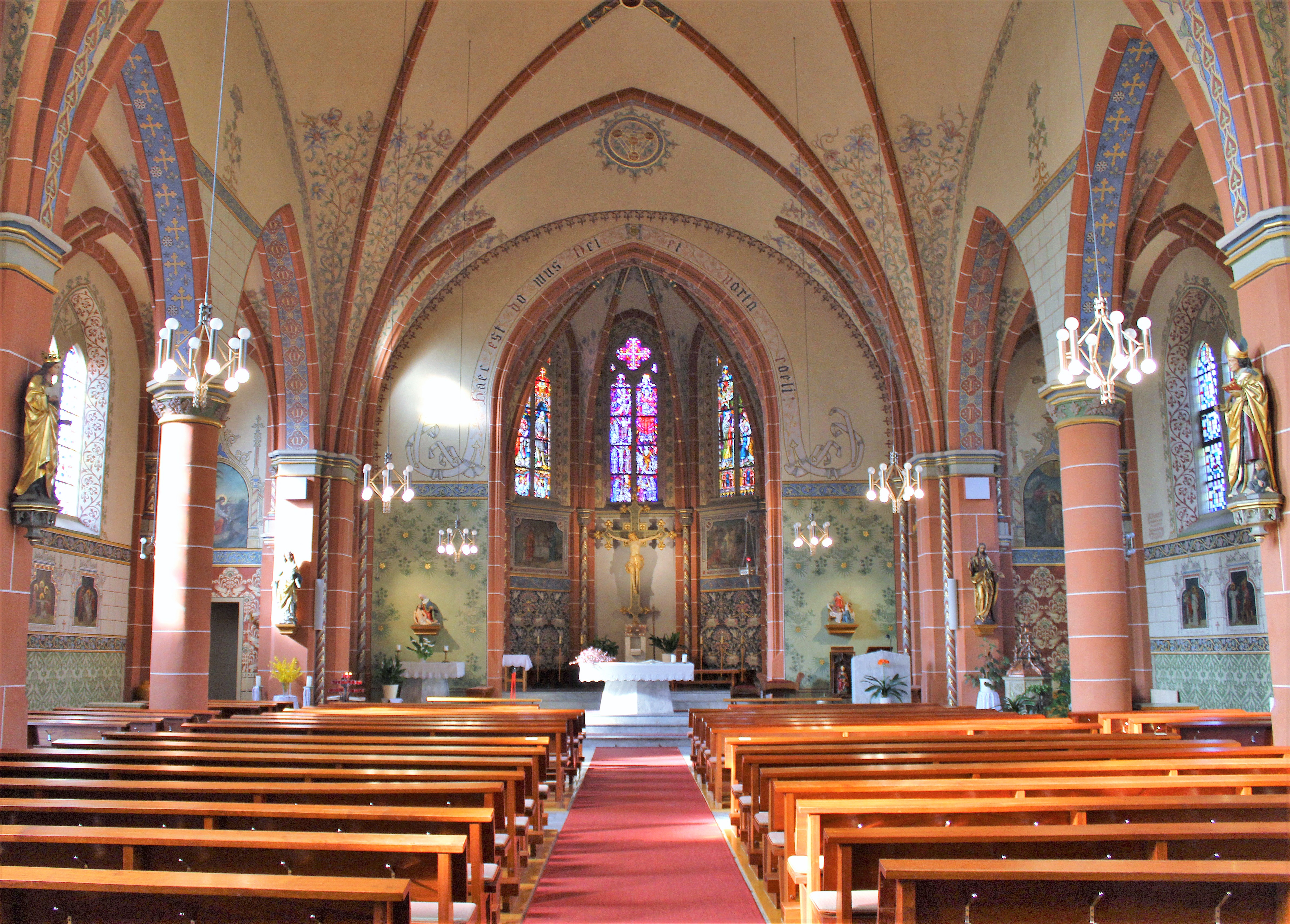 Blick ins Innere der katholischen Pfarrkirche St. Leodegar in Düppenweiler, einem Ortsteil der Gemeinde Beckingen, Landkreis Merzig-Wadern, Saarland